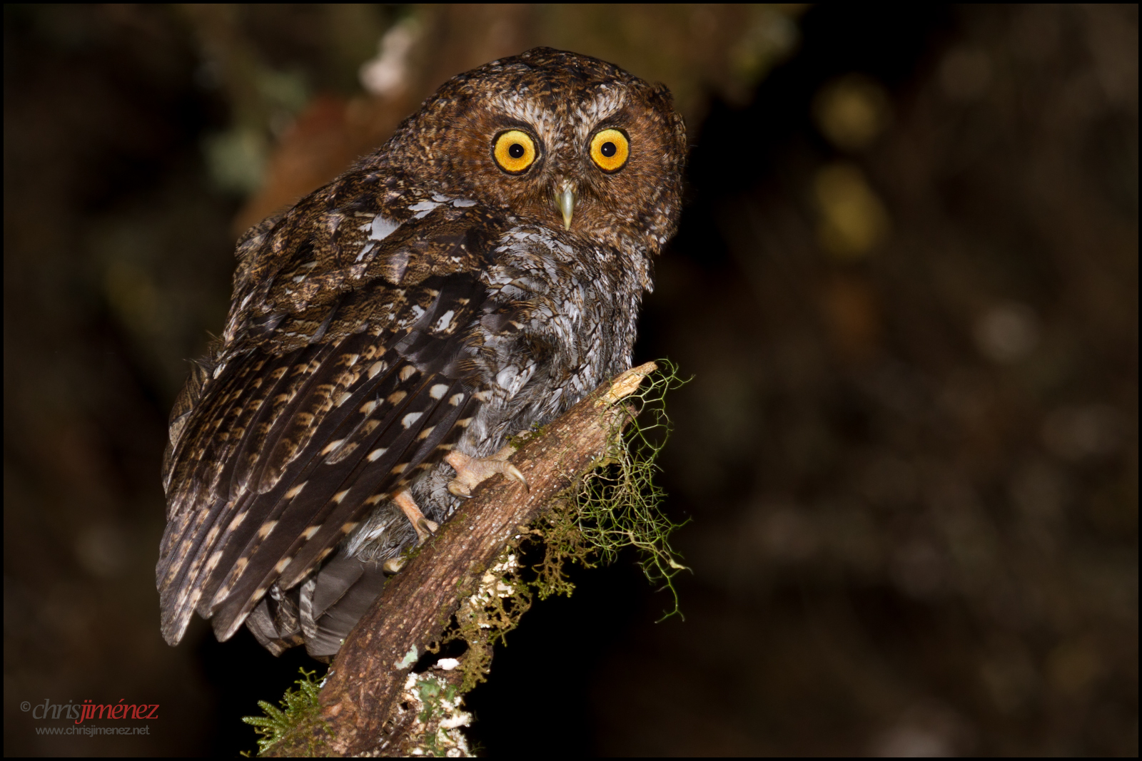 Cerro de la muerte, Costa Rica